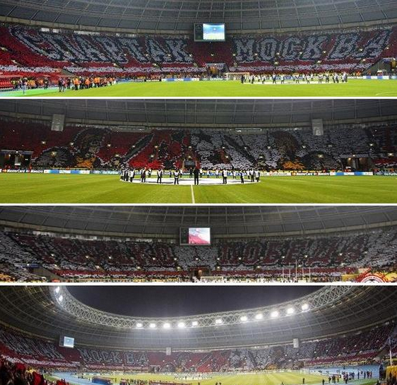 Перфоманс на матче Спартак - Барселона. 2012 год.